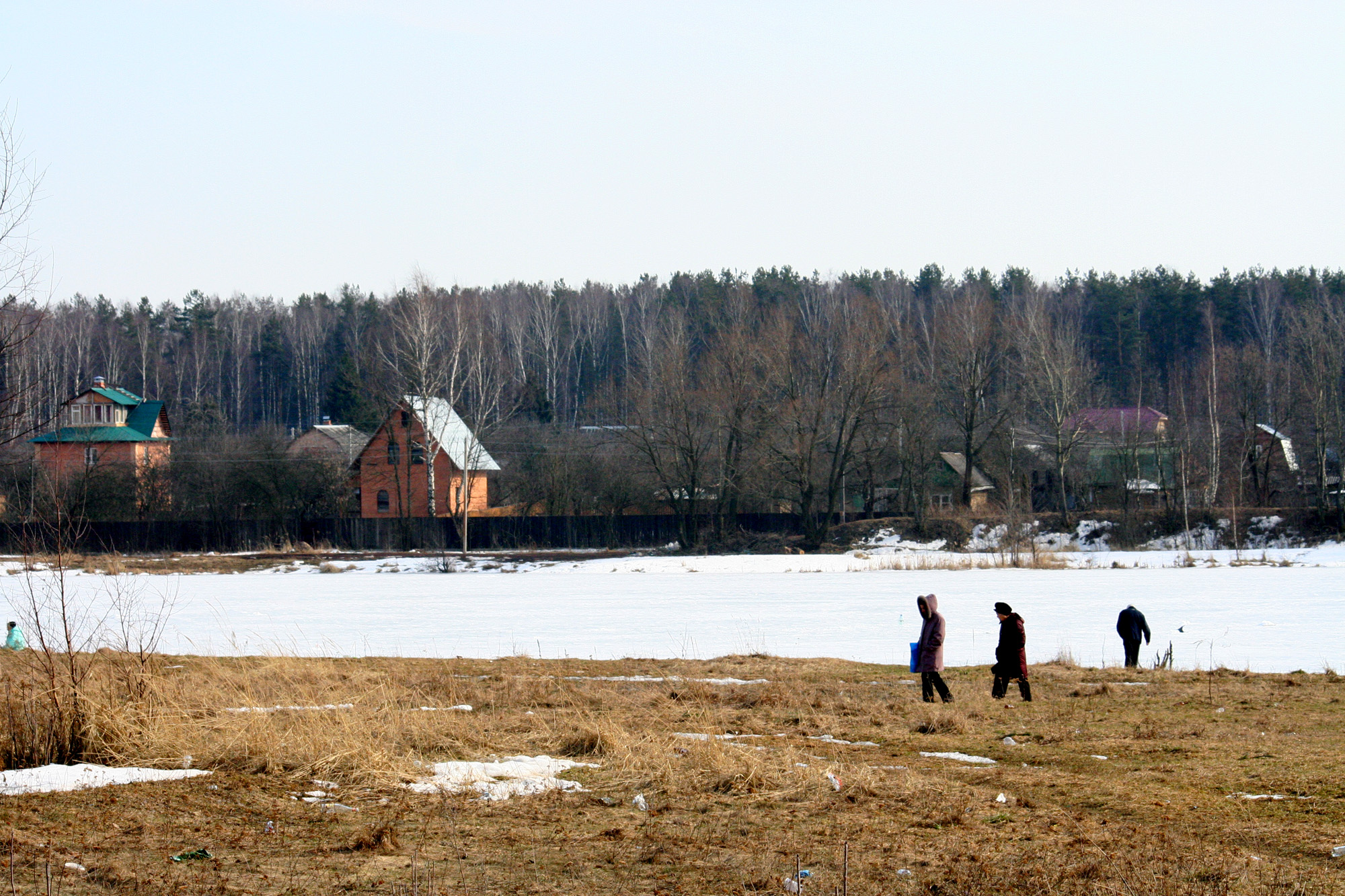 Озеро в Электроуглях